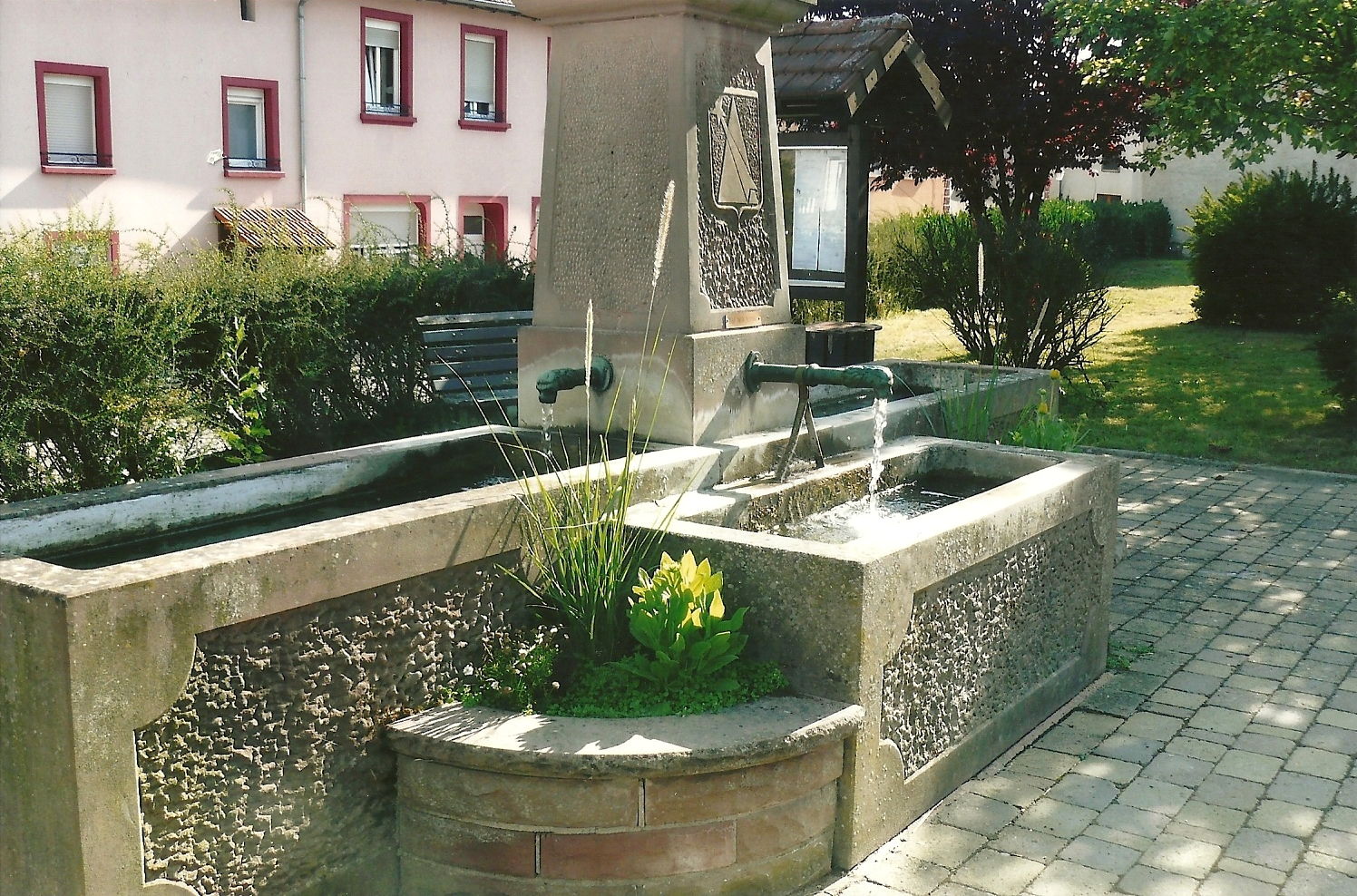 Fontaine du Village de Coume